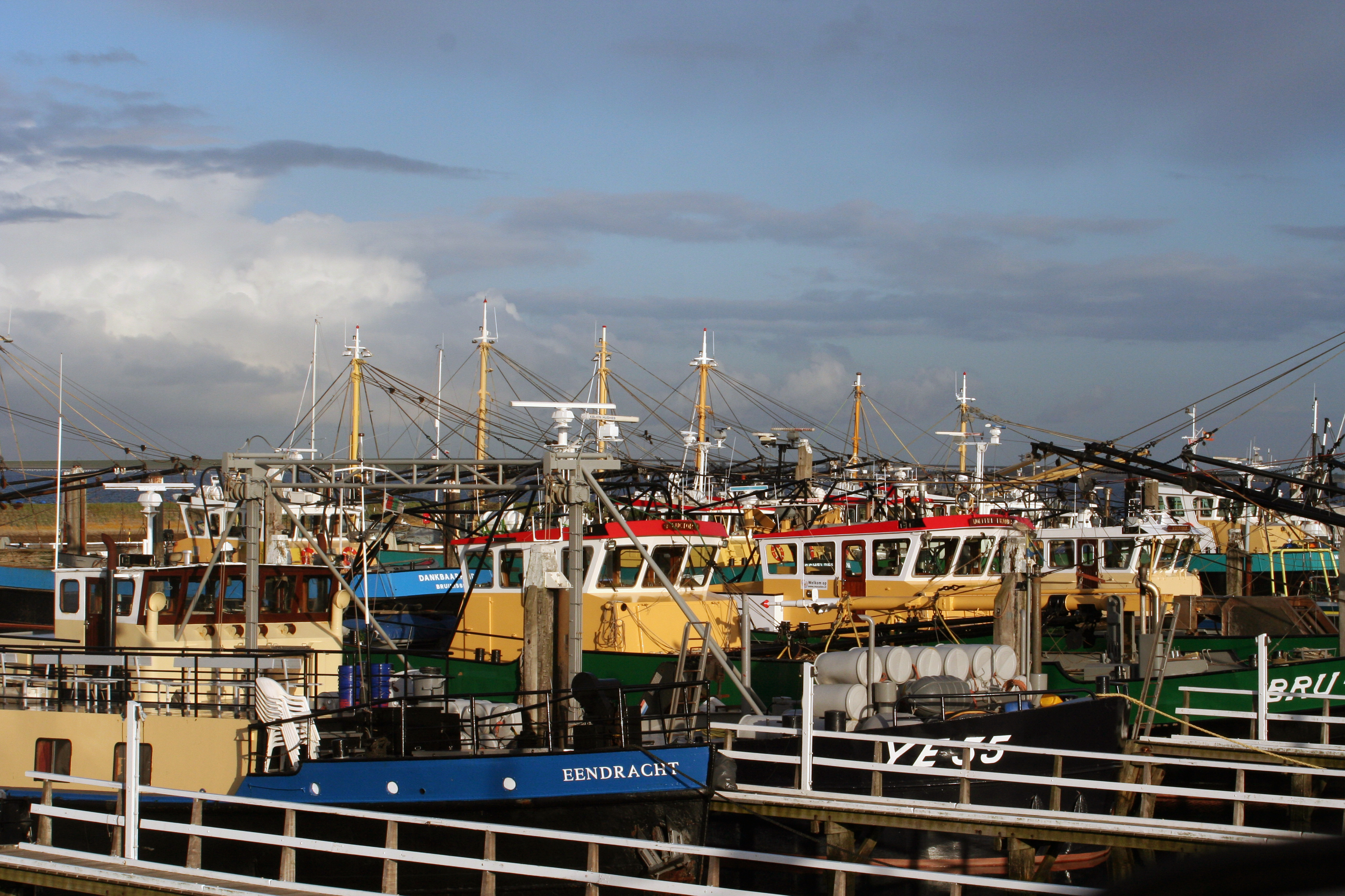 Fischereihafen in Bruinisse